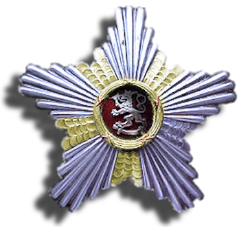 Suomen Leijonan ritarikunnan suurristin rintatähti.